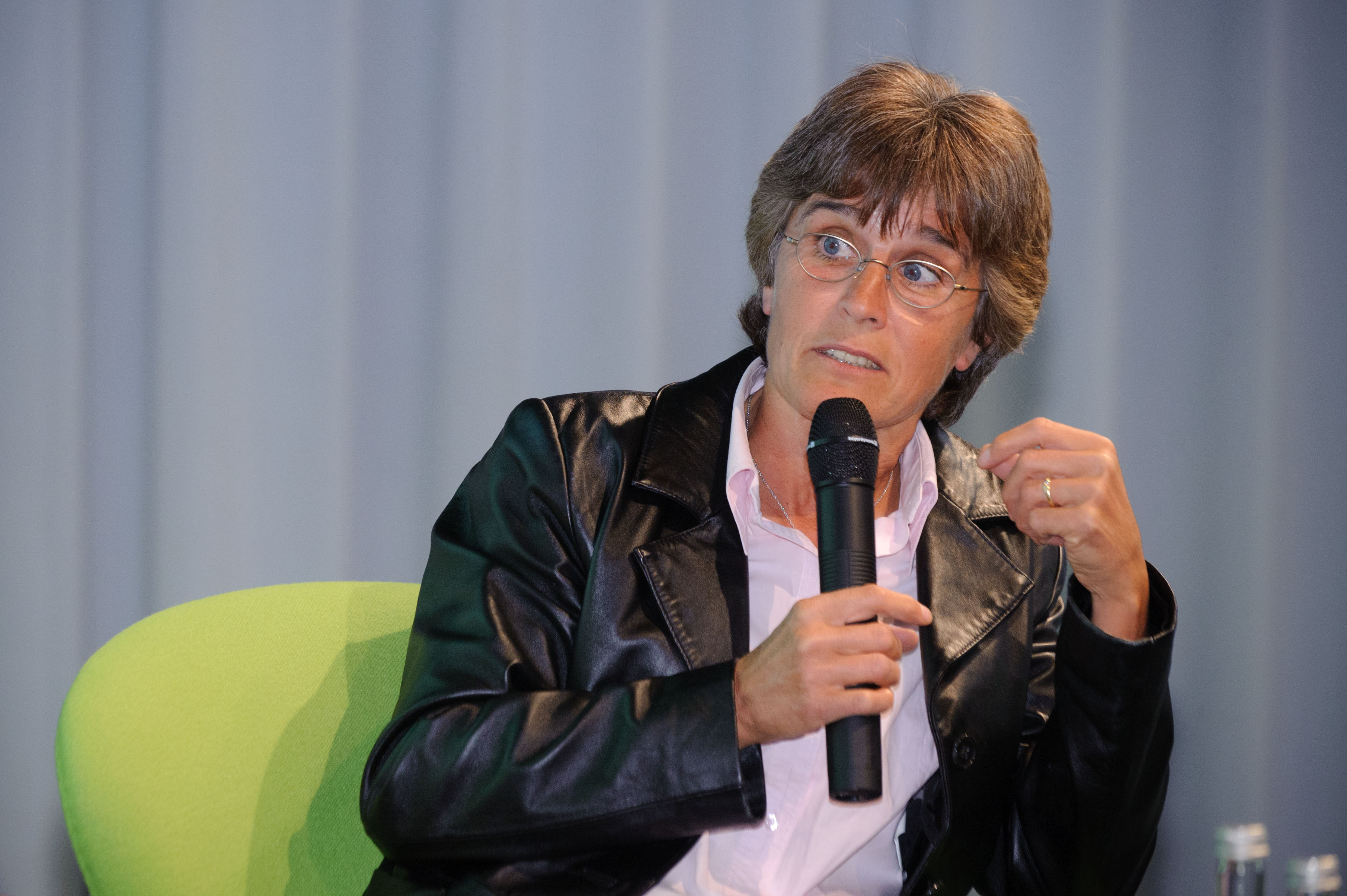 Monika Staab (Frauenfußball-Pionierin, FIFA-Consultant) Foto: Stephan Röhl